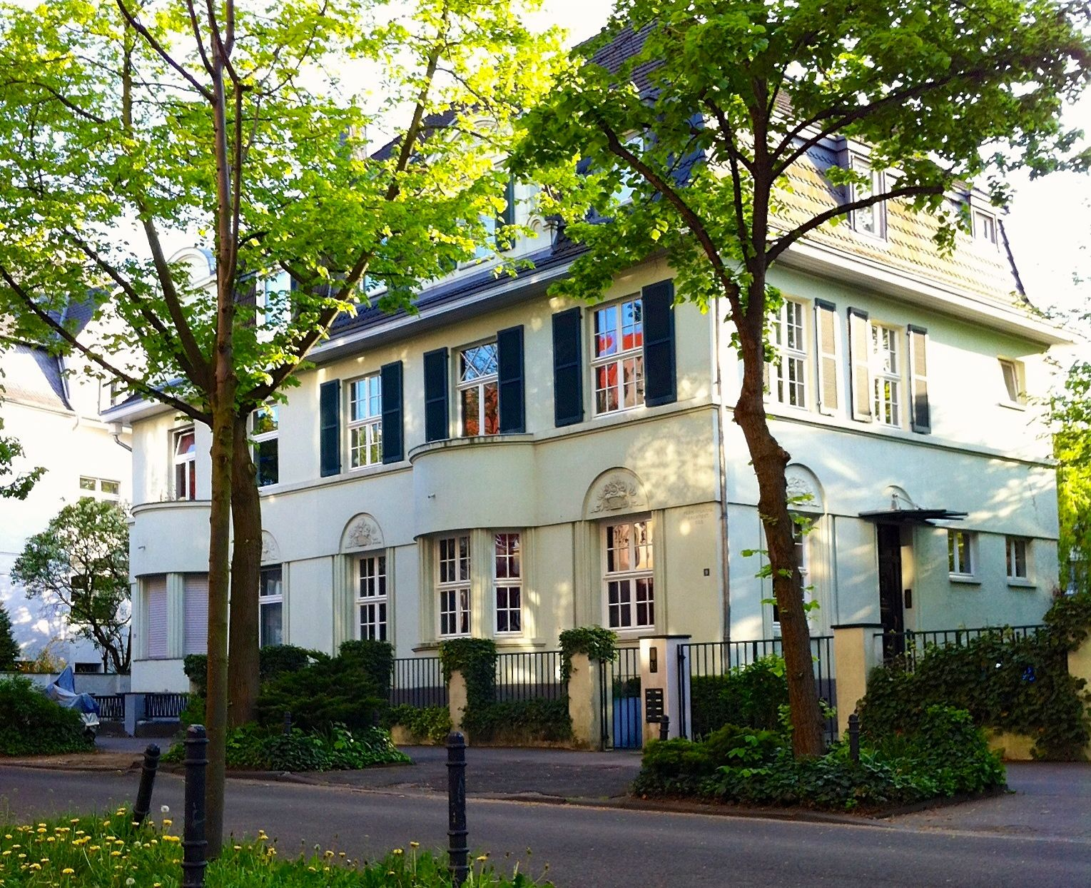 Wohnhaus, Lindenburger Allee 9, Architekt Herm. PflaumeThis is a photograph of an architectural monument.